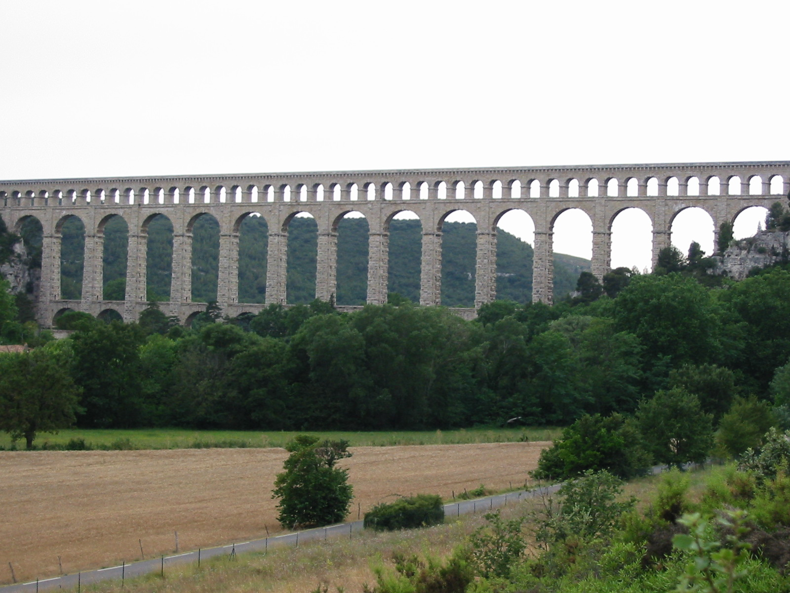 Aqueduc de Roquefavour (Ventabren)